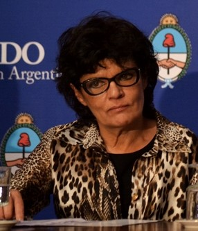 Elena Corregido, senadora nacional